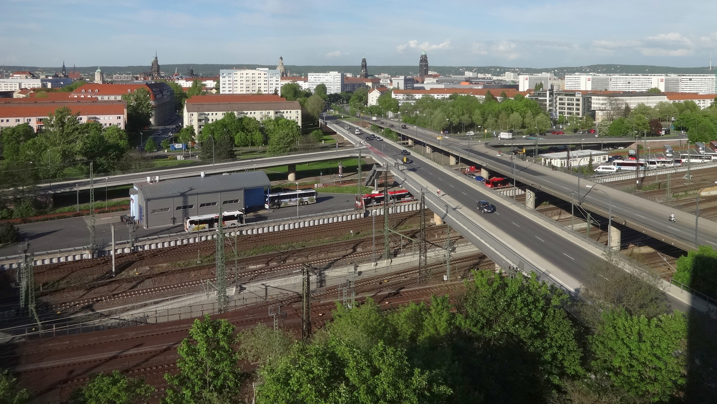 Brücke Budapester Straße, aufgenommen aus dem Studentenwohnheim Budapester Straße 22. Gut zu erkennen die zwei Richtungsfahrbahnen, die auf zwei „Einzelbrücken“ zuerst die Bahnstrecke und dann den Betriebshof des Regionalverkehrs Dresden passieren. Danach zweigen von beiden Teilen Zweigstraßen ab, die die Brücke ähnlich wie bei Anschlussstellen auf Autobahnen mit der Ammonstraße verbinden. Im Hintergrund die Altstadt von Dresden